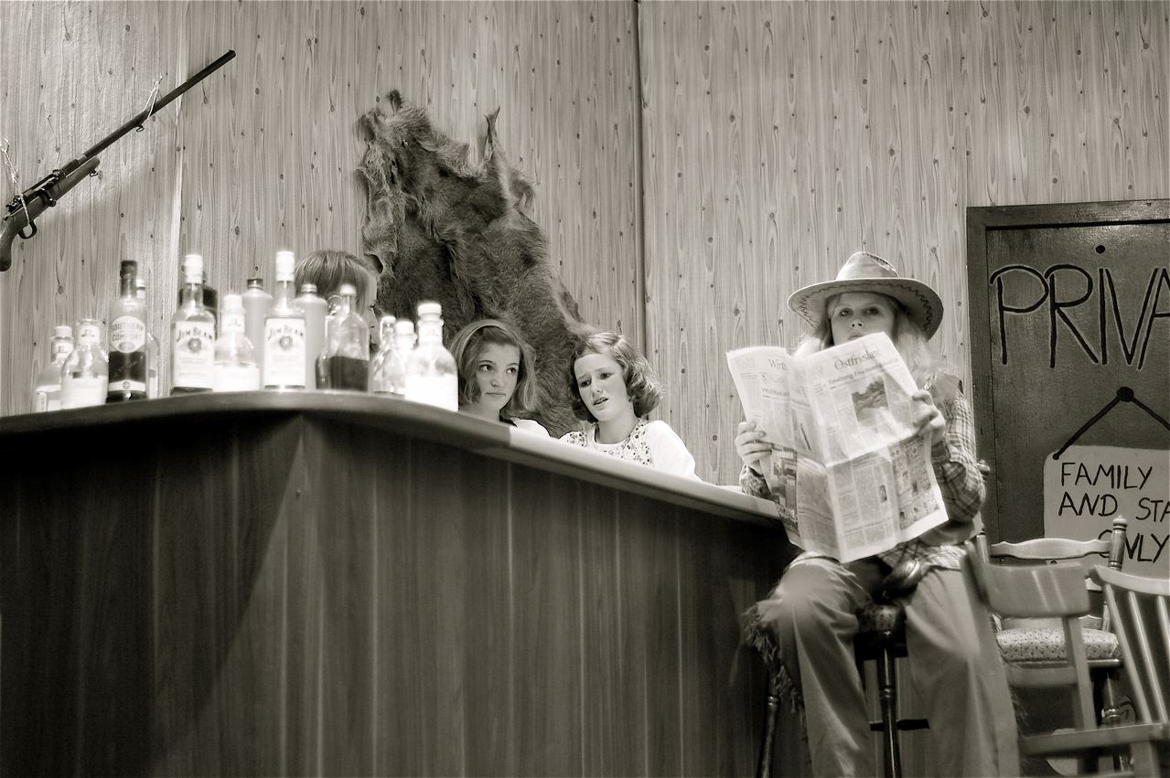 FCSO-Schüler führen das Stück "Spiel mir das Lied vom Wischmopp" auf, 22. April 2012